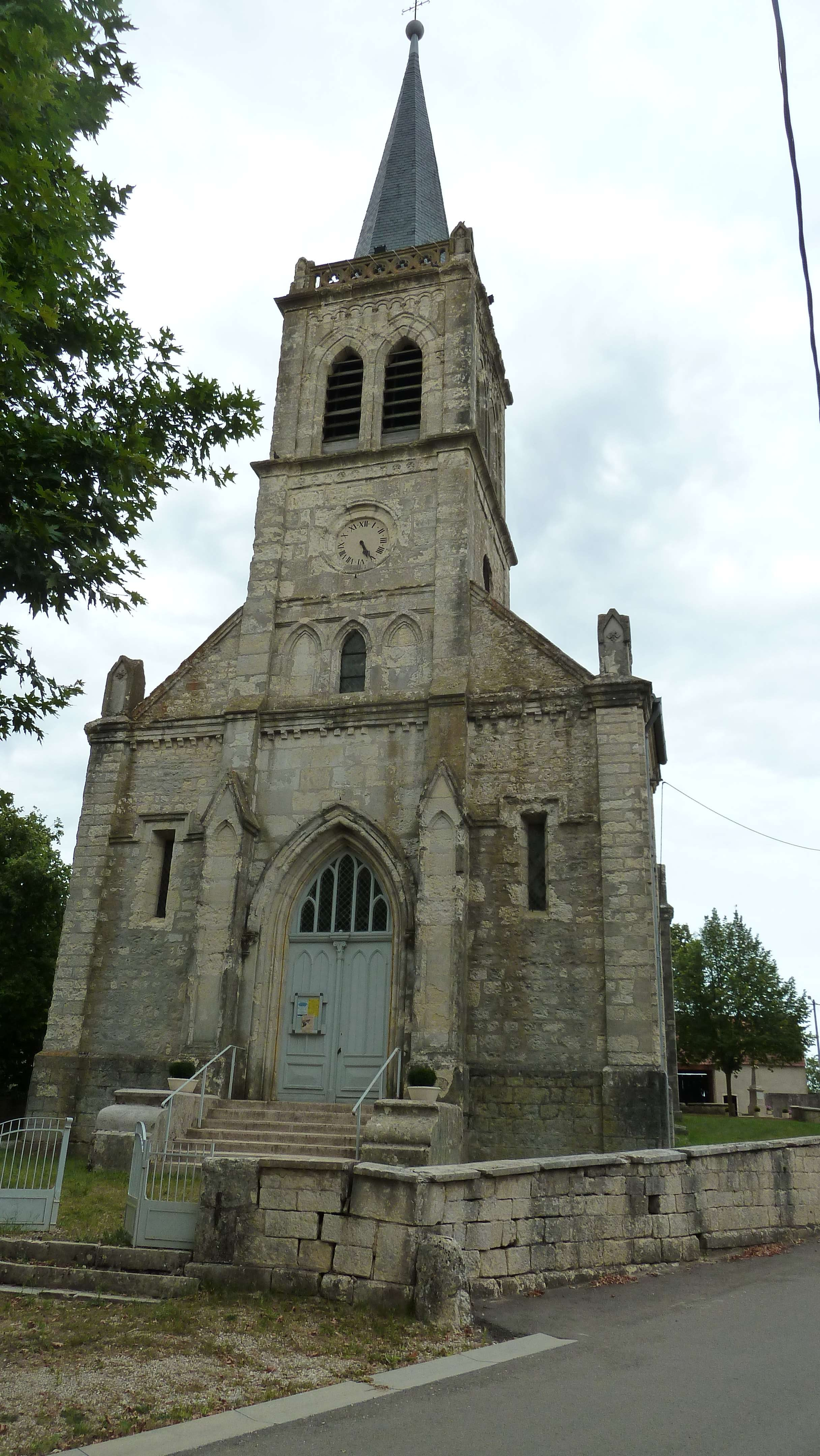 Eglise d'Etevaux.